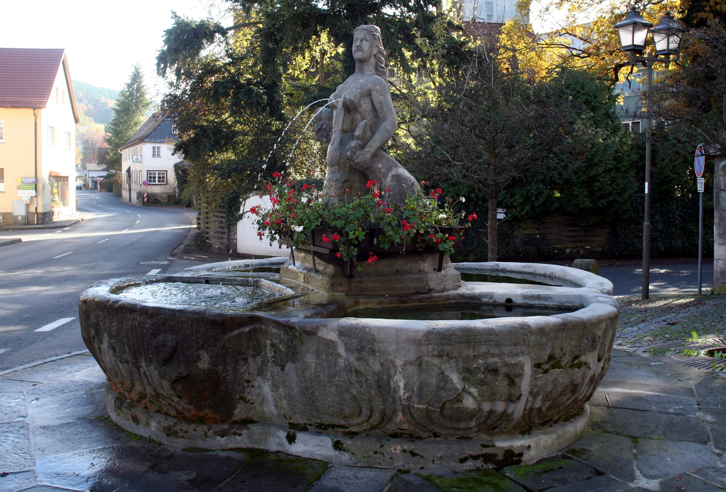 Brunnen Jungferkättl in Weißenbrunn in Oberfranken Landkreis Kronach